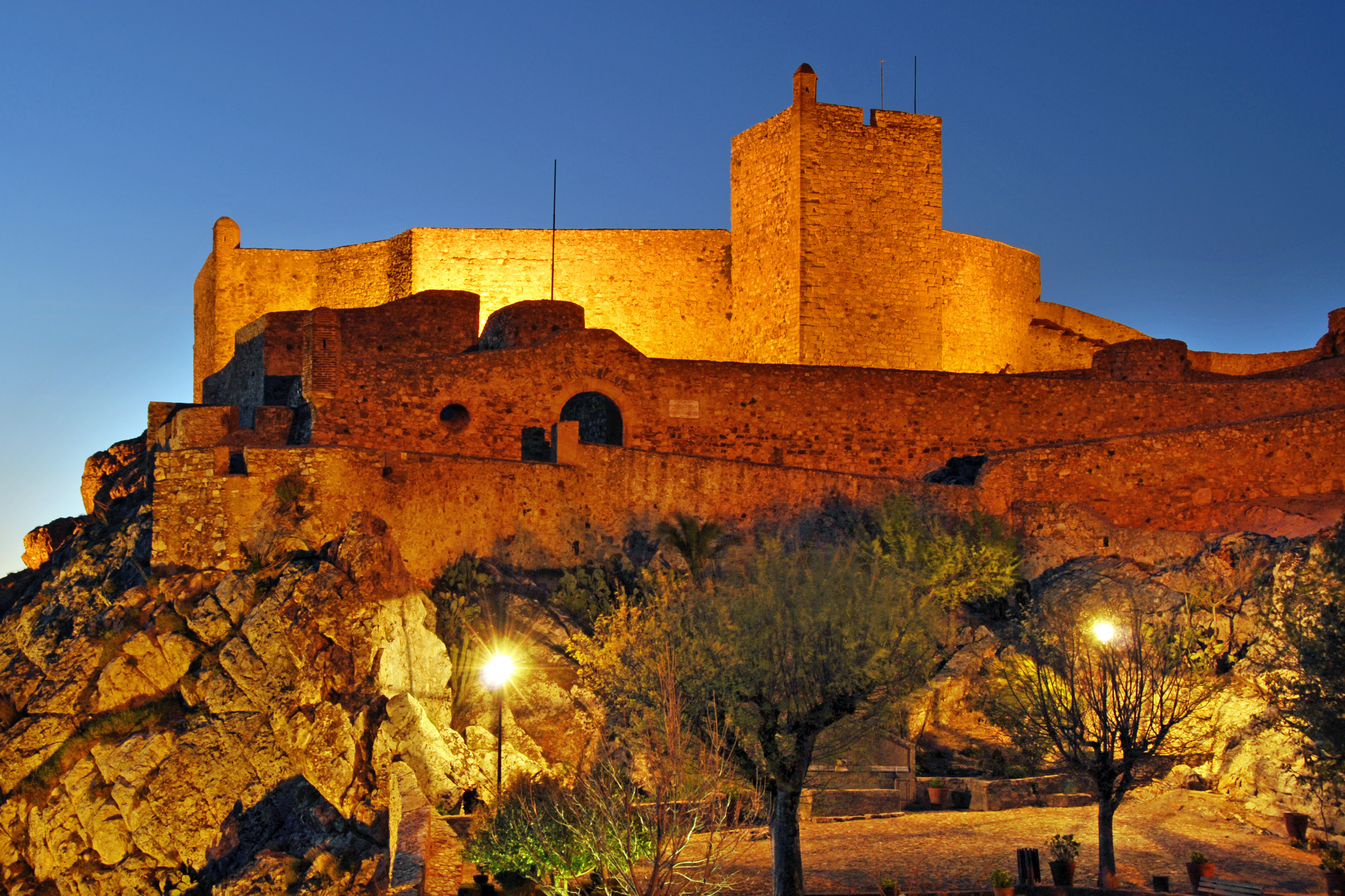 Castelo de Marvão This file was uploaded for Wiki Loves Monuments in Portugal with the unique identifier 70363.